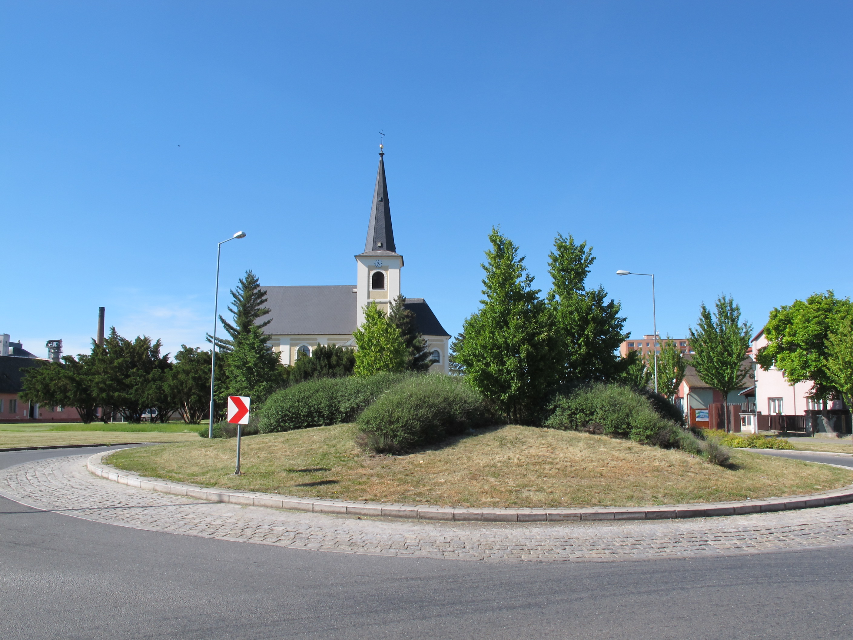 Kostel svatých Jakuba a Filipa, Staroměstské náměstí, Litovel. Pohled přes kruhový objezd na Dukelská / Žerotínova. This file was uploaded during the project of WikiTown Litovel.